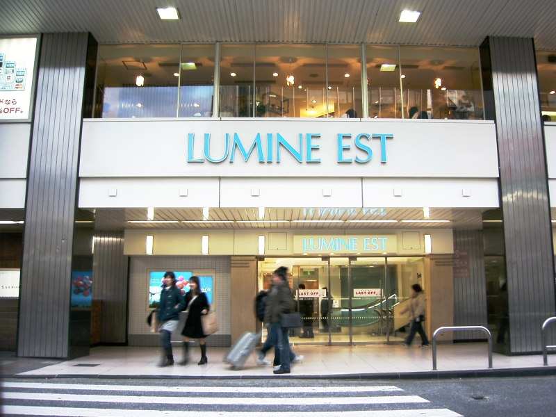 LUMINE EST Shinjuku